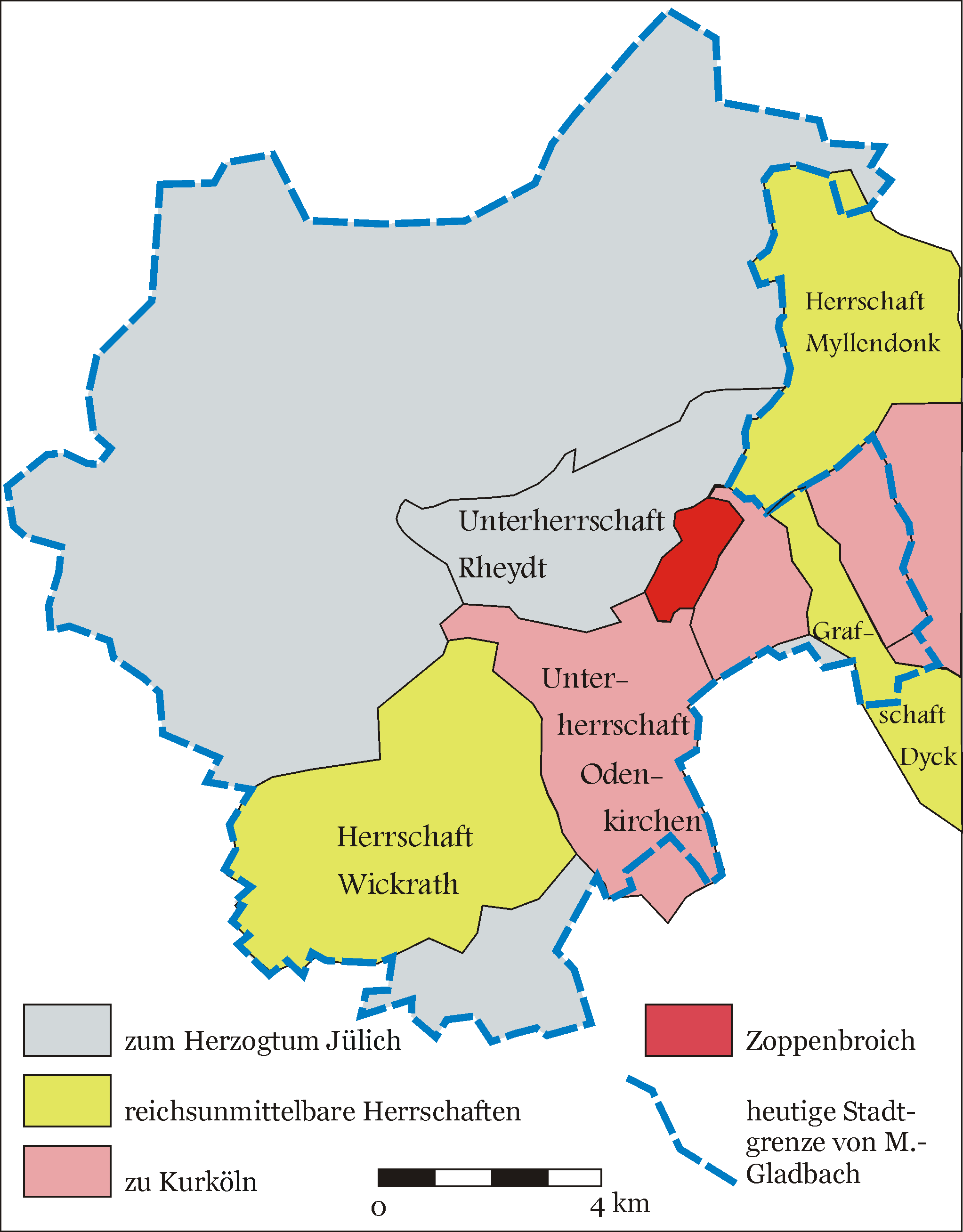 Unterherrschaft Zoppenbroich und Umgebung um 1720